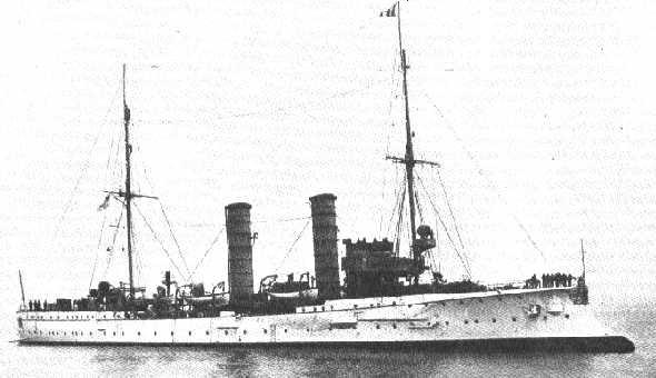 SMS Niobe (Gazelle class)